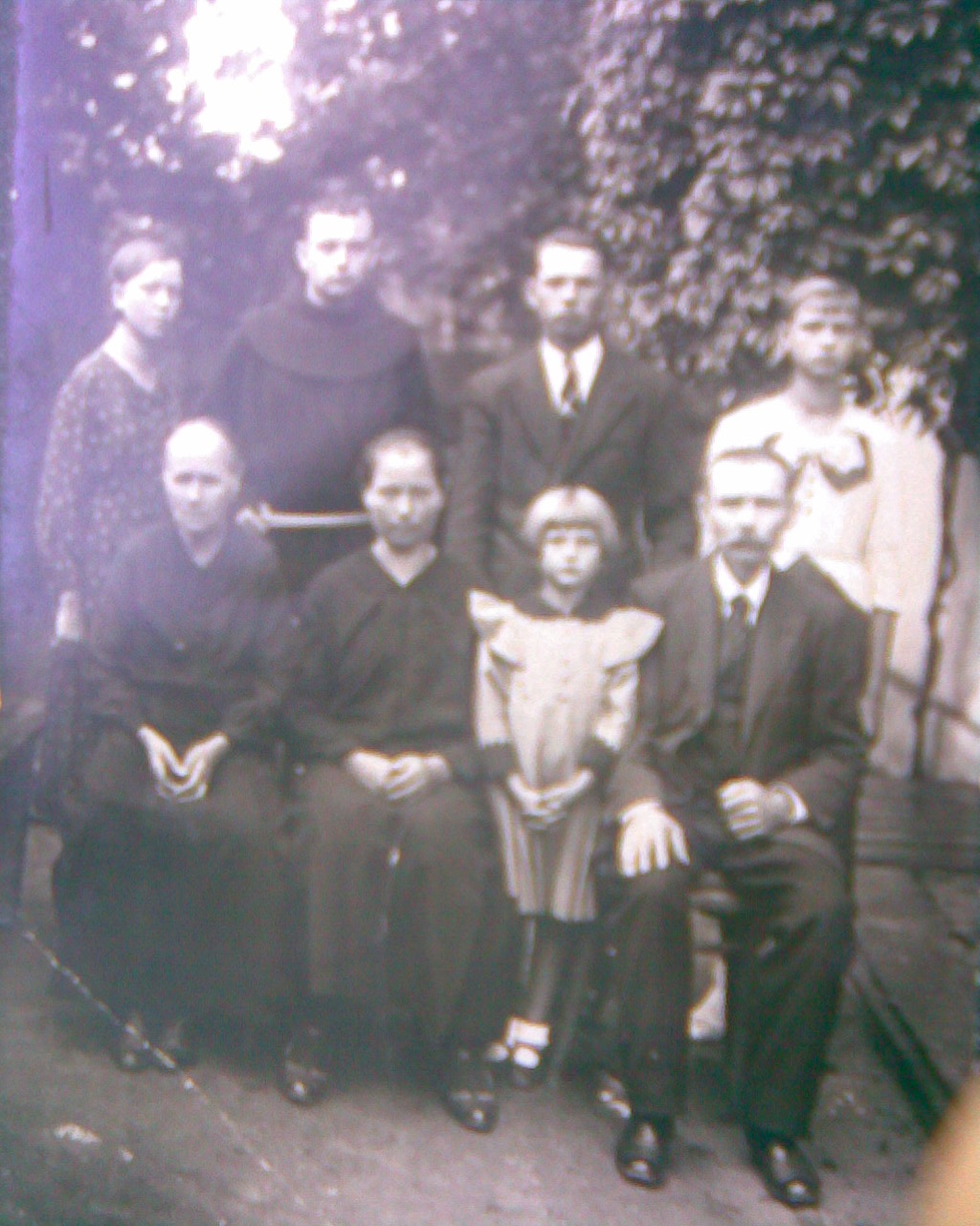 lll